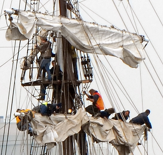 Bergen der Segel auf der Thor Heyerdahl während der Kieler Woche 2007